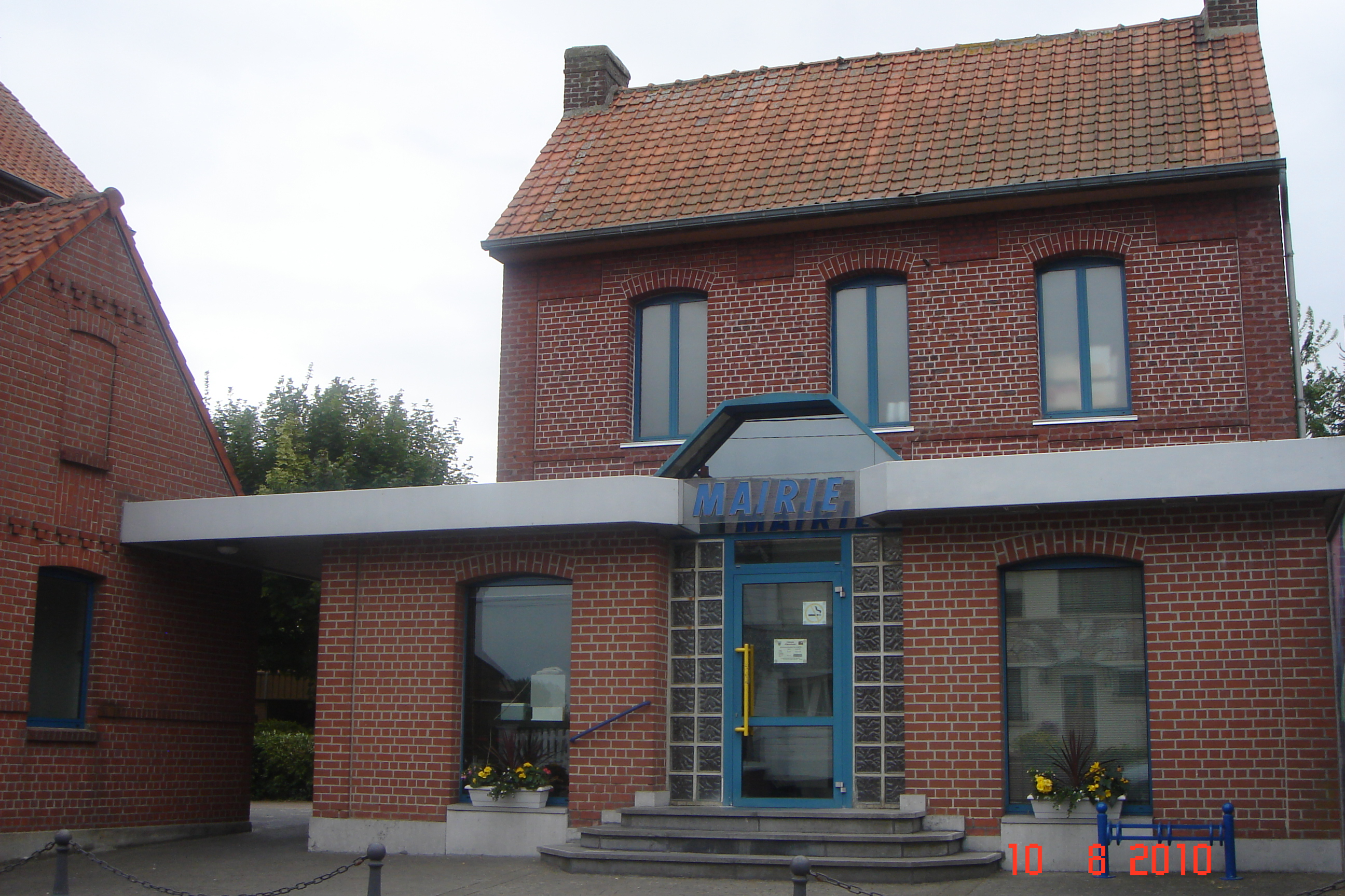 La mairie d'Emerchicourt - département du Nord - France